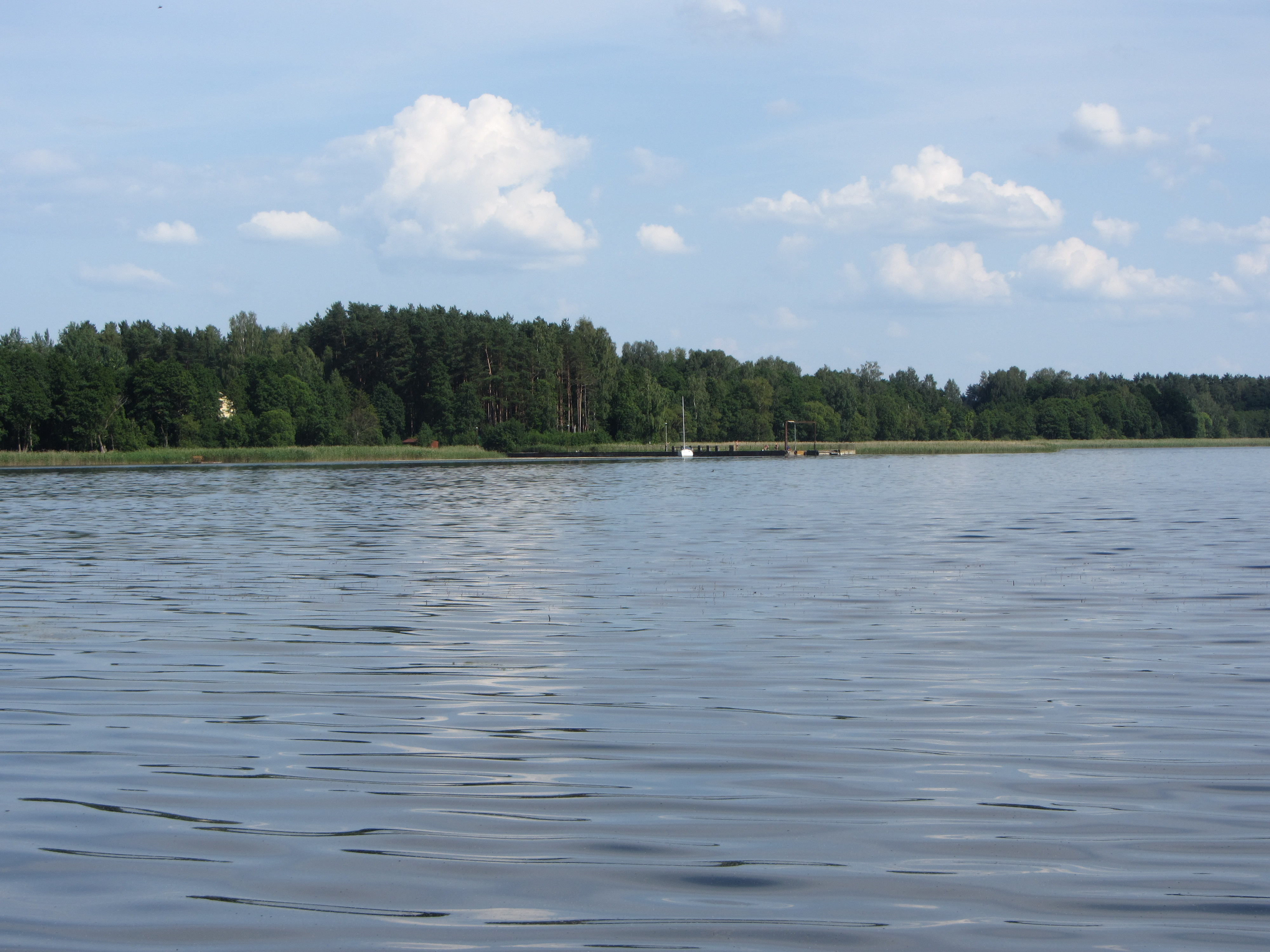 Tilžė 32200, Lithuania